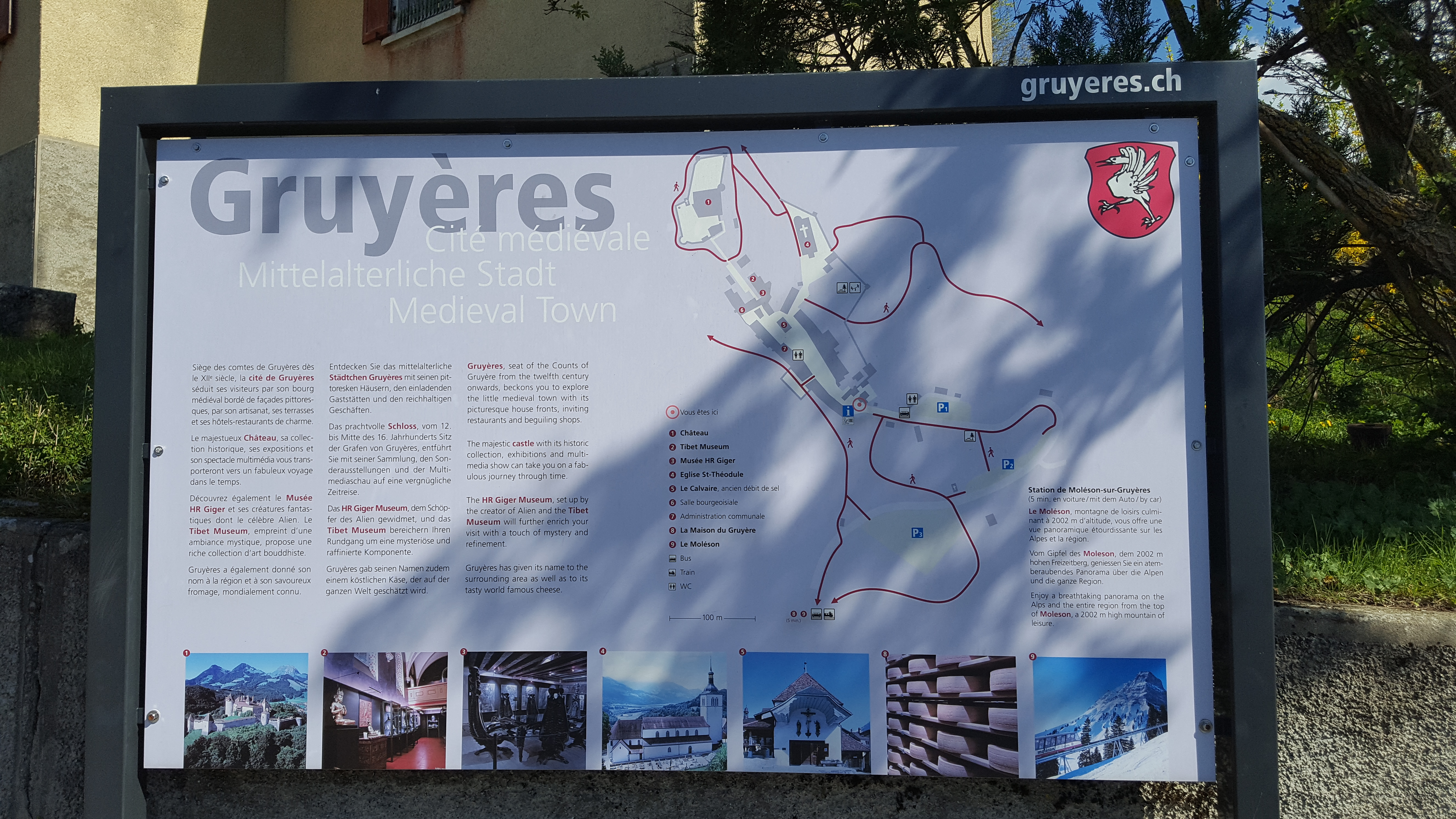 Informationsschild